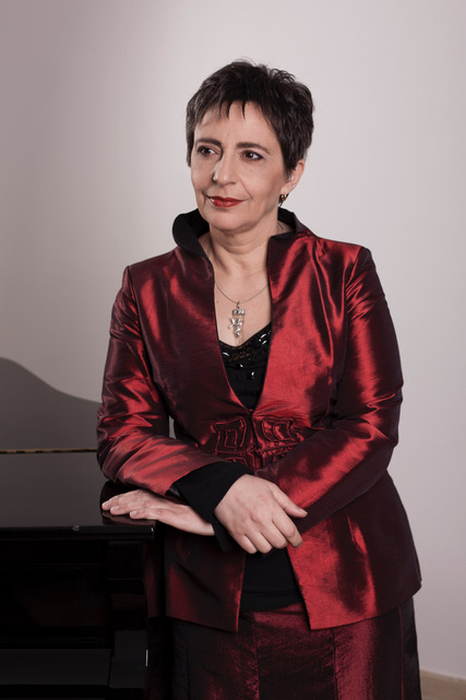 Portrait de Violaine Prince par Tam Tu-Lê en 2012